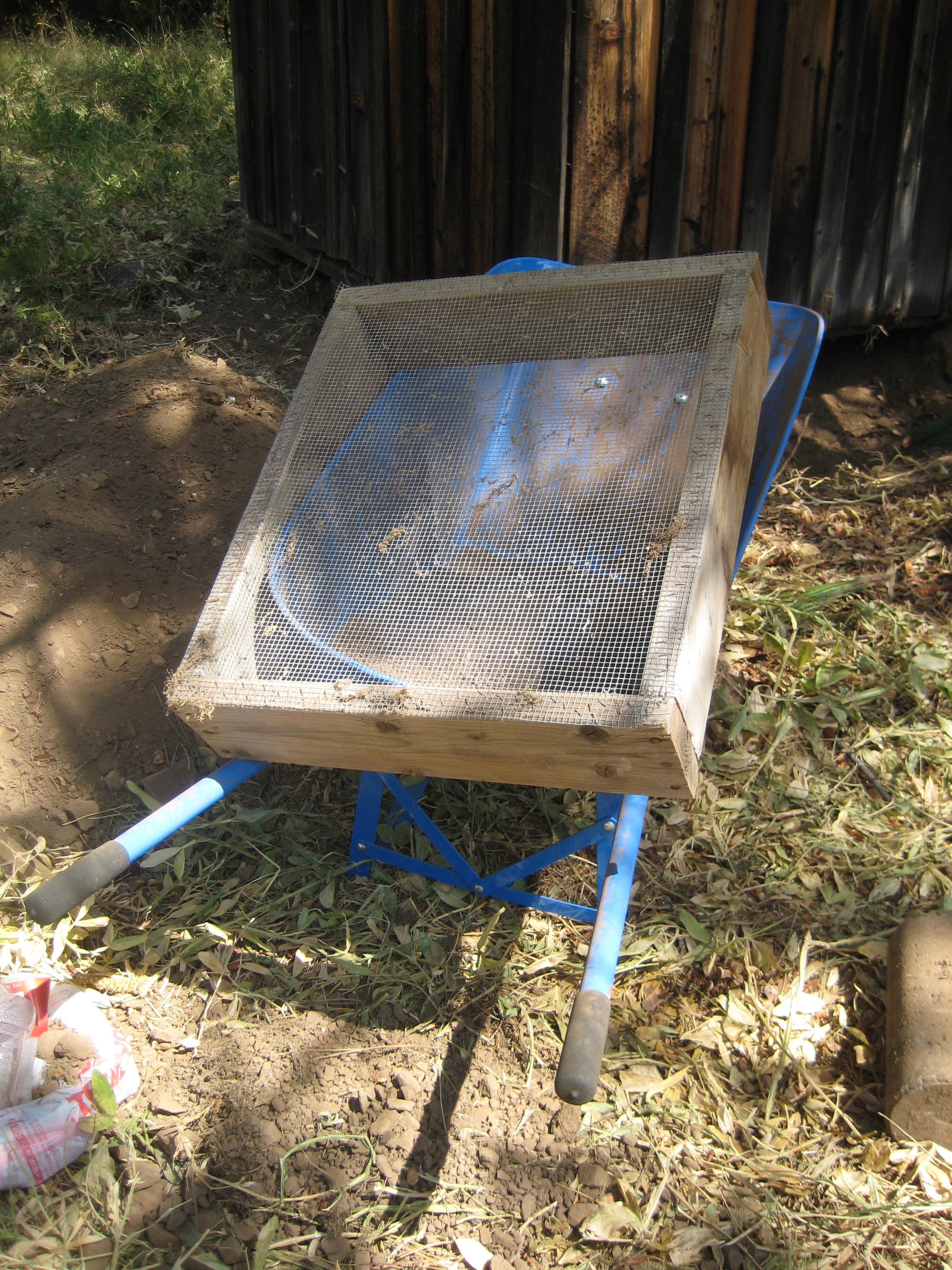 soil sifter!